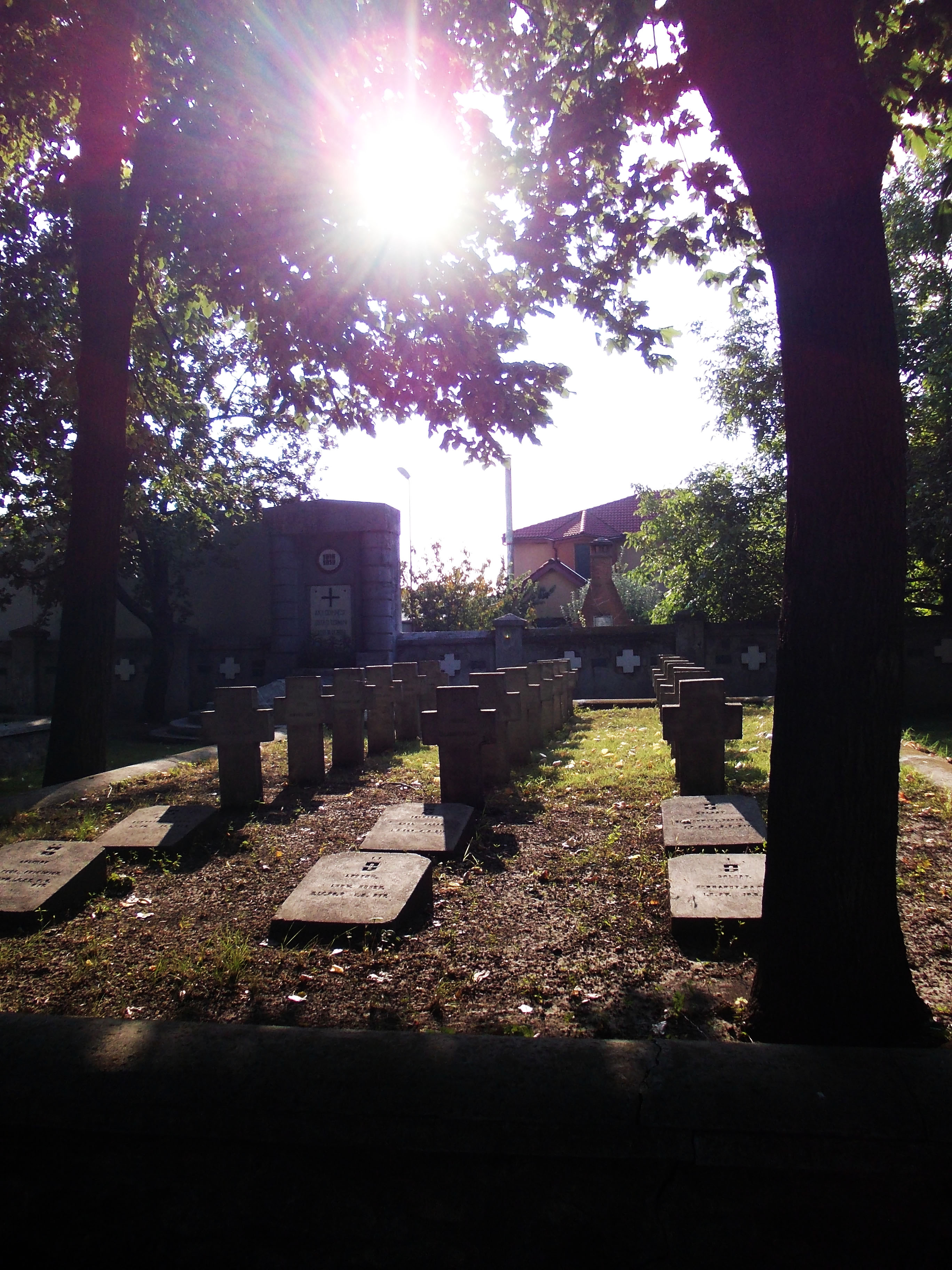 Cimitirul Mina - interior - stânga